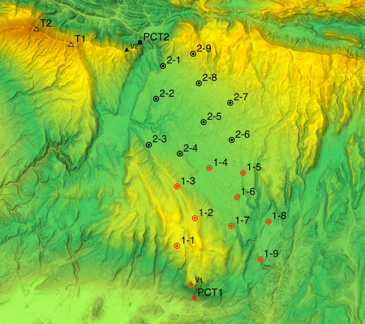 Carte topographique du plateau d'Albion et positions des 18 Zones de Lancement (1-1 à 2-9), antennes (V), entrées des Postes de Contrôle de Tir (PCT) et relais (T) de la base aérienne 200 Apt-Saint-Christol.